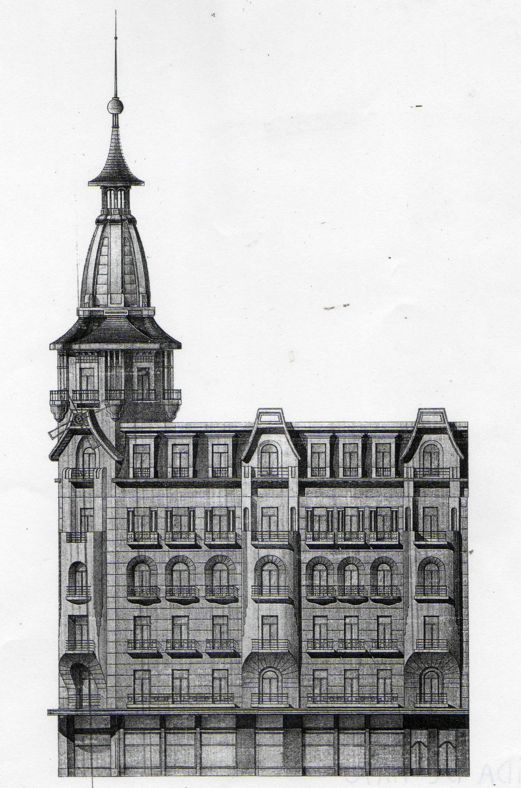 Detalle arquitectónico